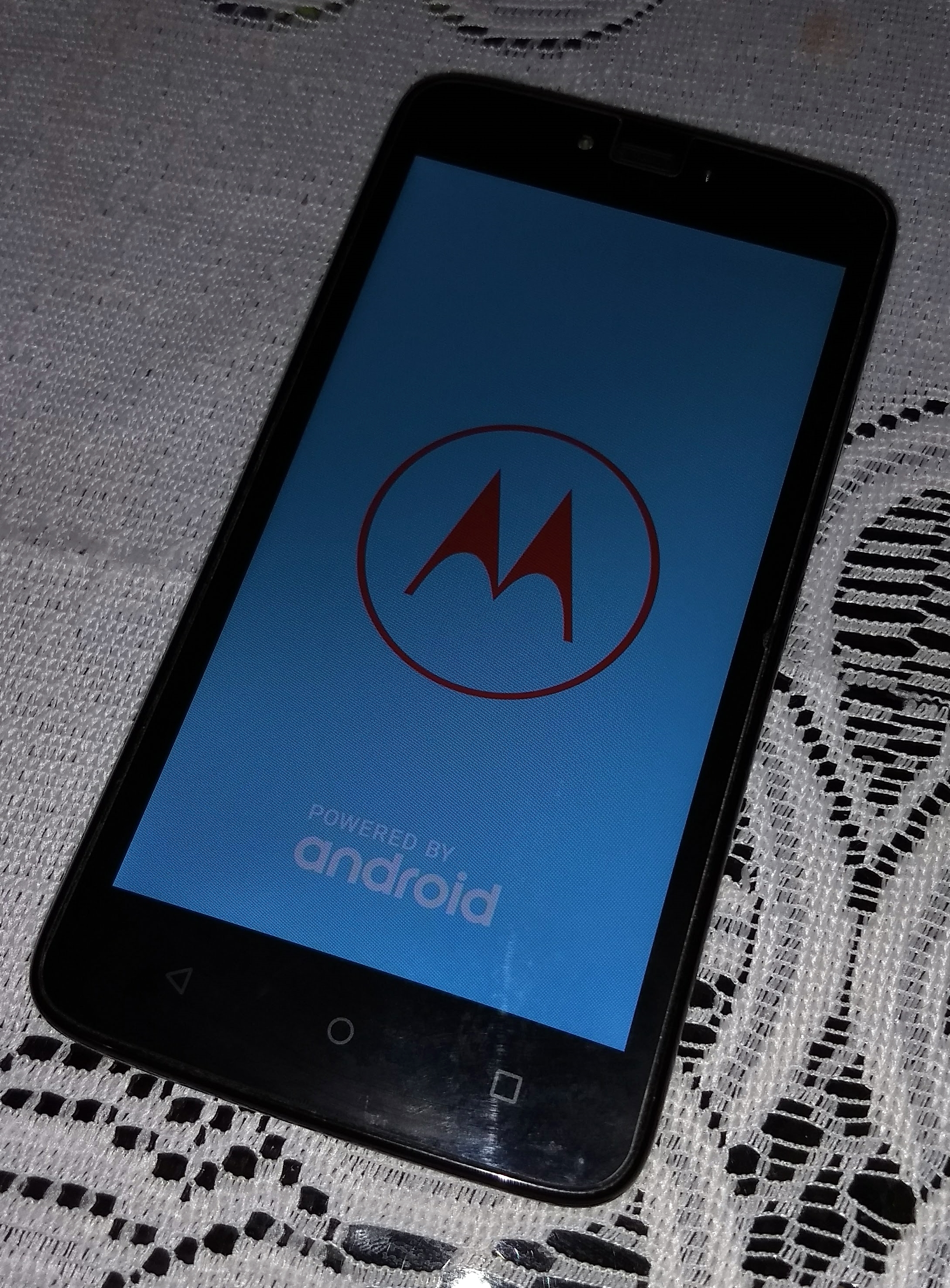 Moto C XT1750 negro con Android 7.0, funcionando con Claro Colombia y vendido en Claro Colombia